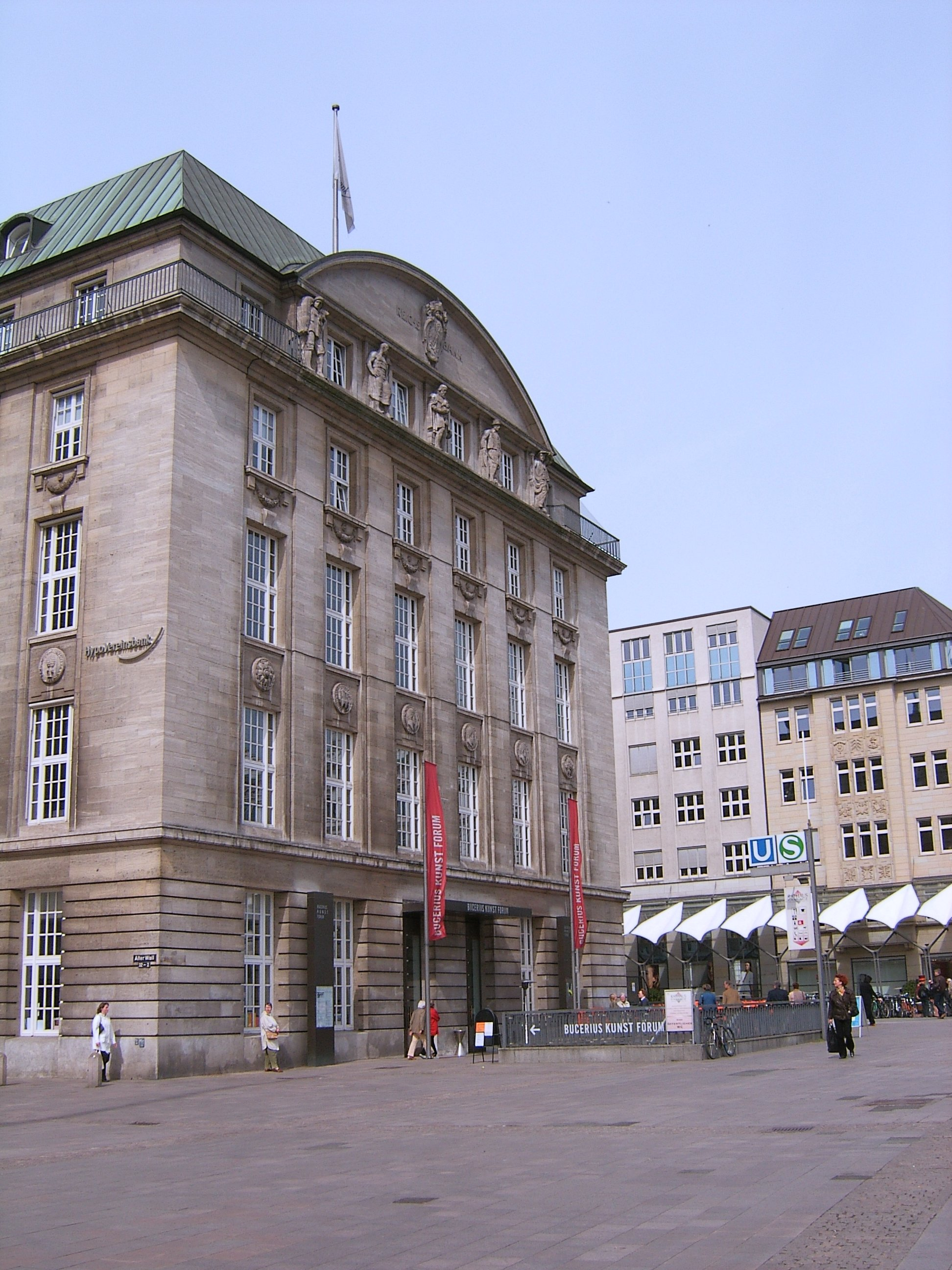 Die ehemalige Hamburger Hauptstelle der Reichsbank am Alten Wall 2 in Hamburg-Altstadt wurde 1914 bis 1919 nach Entwürfen der Bauverwaltung der Reichsbank errichtet. Nach Umbauten beherbergt das Gebäude heute eine Bank und das Bucerius Kunst Forum. This is the photograph of an architectural monument. It is part of the list of cultural monuments of Hamburg, no. 680